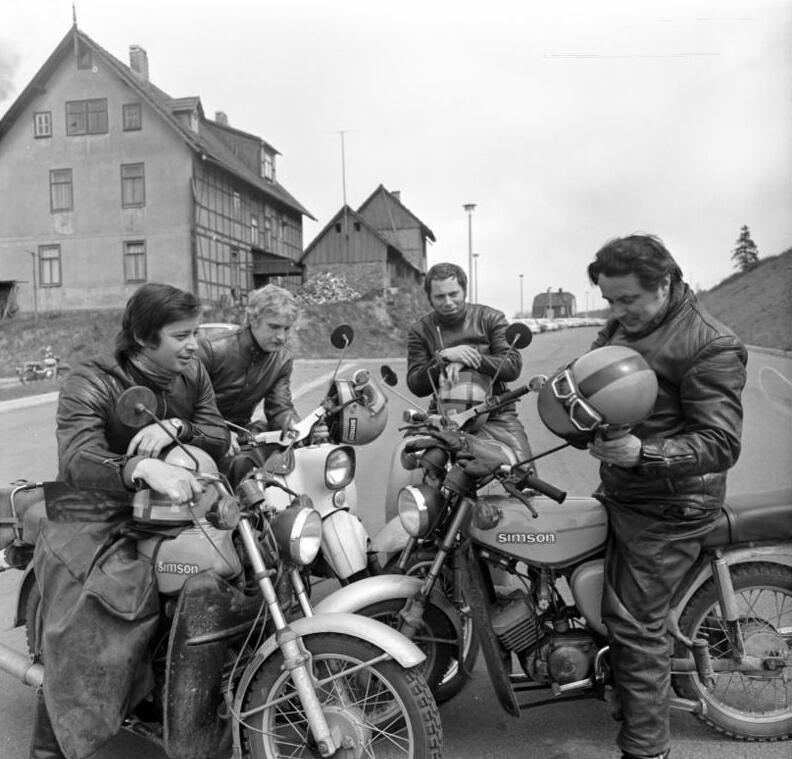 ADN-ZB/Schaar/15.12.78 Suhl: Als Versuchsfahrer auf Kleinkrafträdern unterwegs sind Dieter Salewski, Frank Krech, Günter Kreuzig und Rudi Gilbert (vl.l.n.r.) aus dem Suhler Fahrzeug- und Jagdwaffenwerk "Ernst Thälmann". Rudi Gilbert testet bereits seit 20 Jahren die Zweiradfahrzeuge aus Suhl. Der gelernte Kfz-Handwerker und begeisterte Motorsportler bringt dafür auch die besten fachlichen Voraussetzungen mit. Bis zu 250 Kilometer ist er täglich auf den Testfahrzeugen unterwegs.